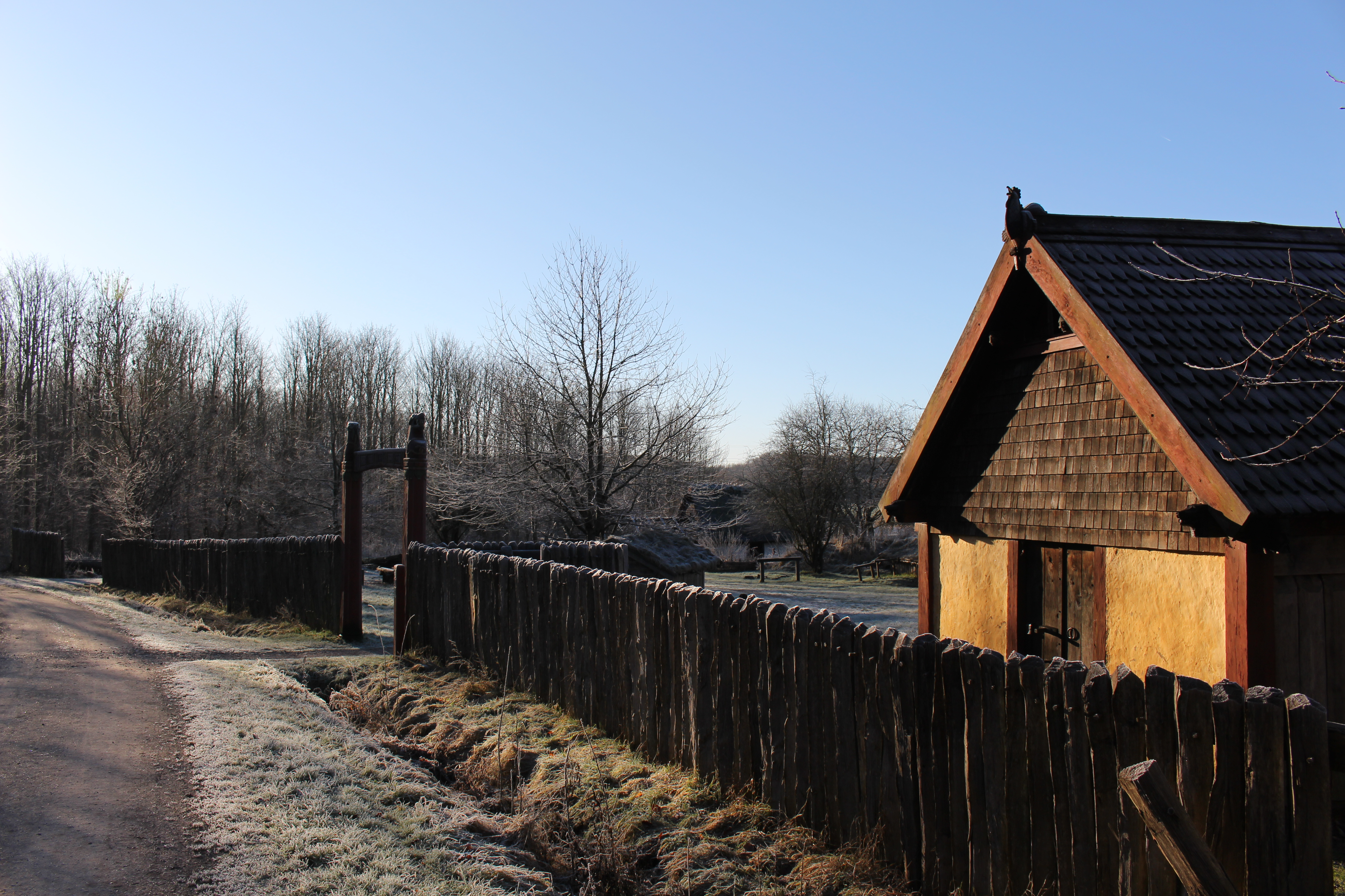 Vikingelandsbyen indgang